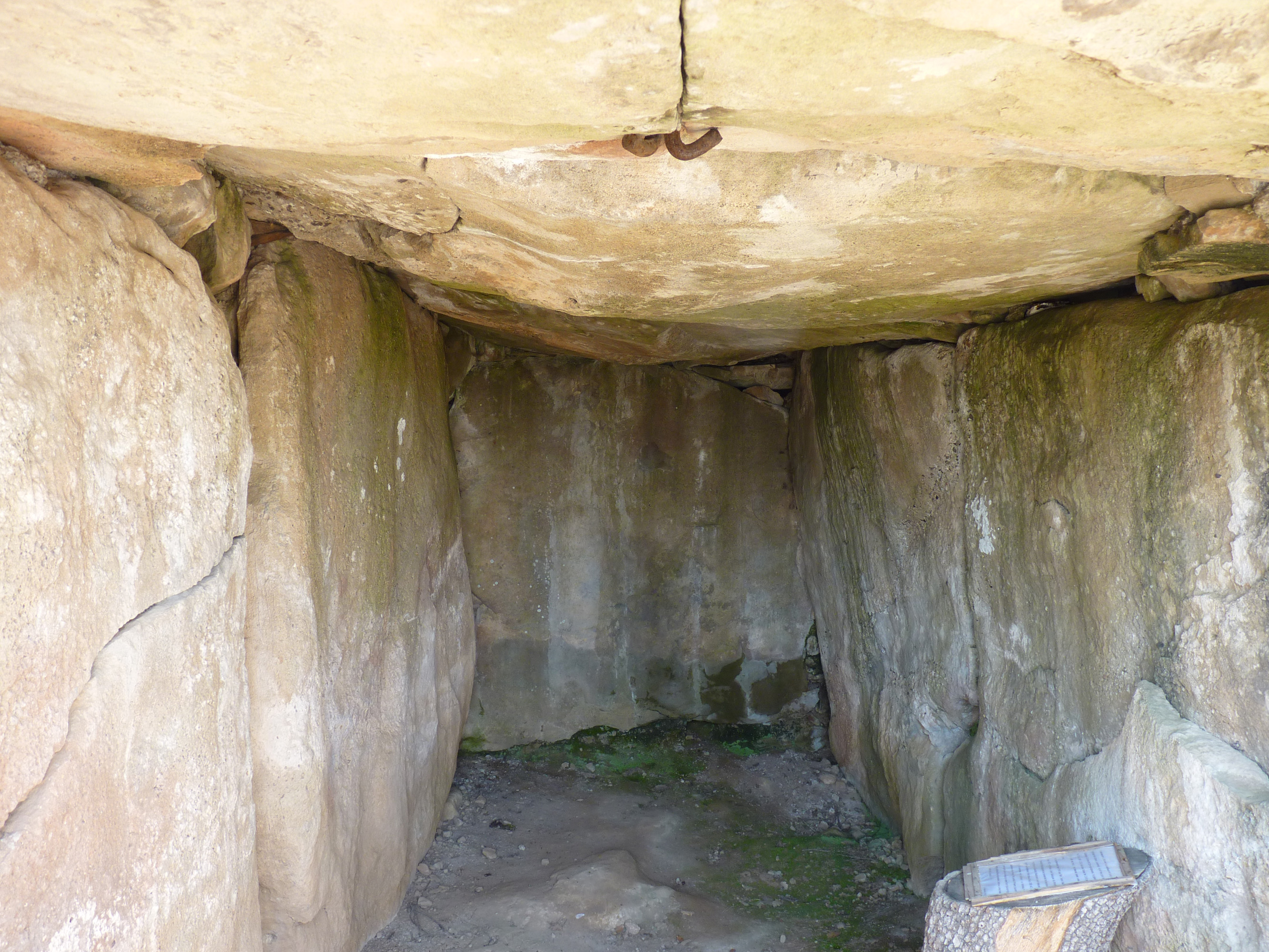 Interior del dolmen de Llobera